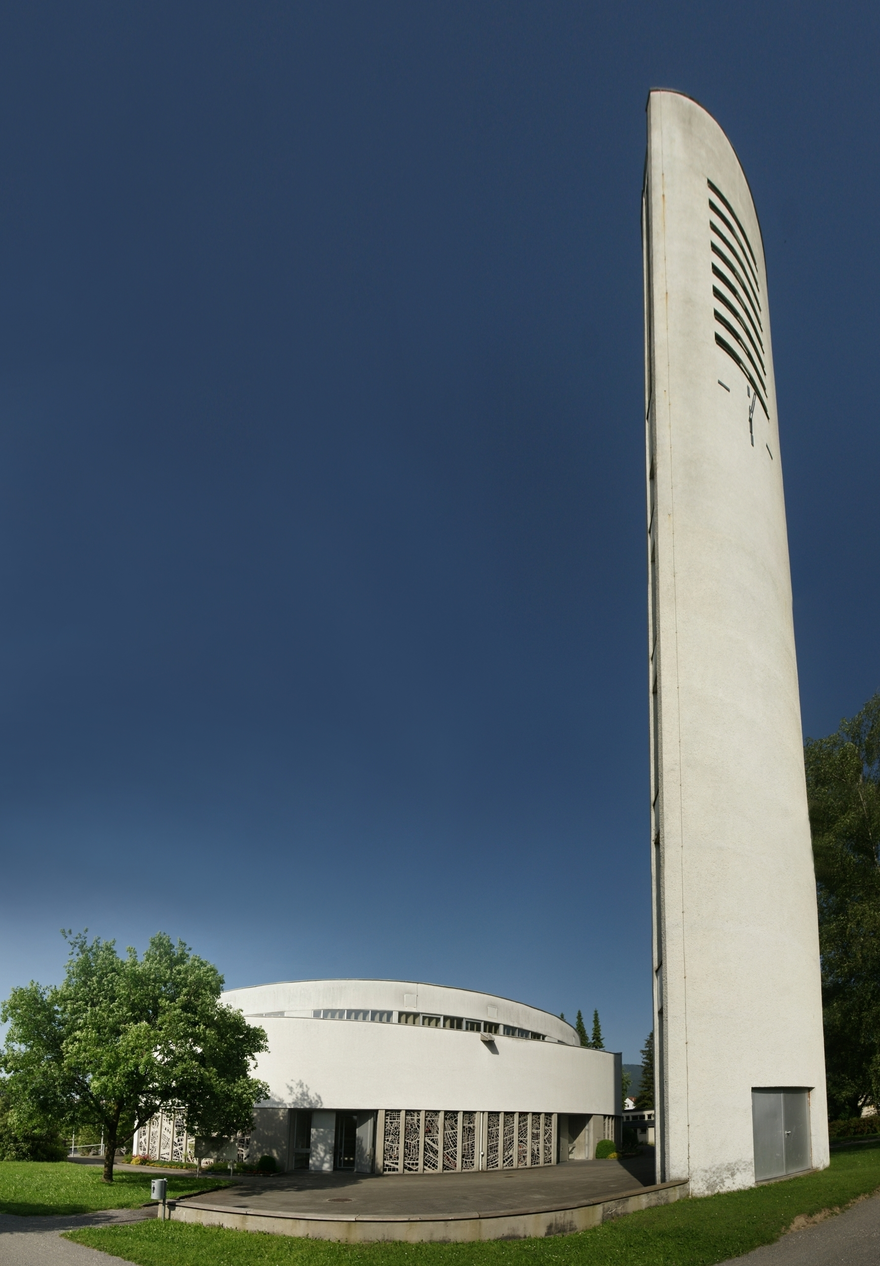 Pfarrkirche hl. Bruder Klaus in Schoren, Dornbirn. Erbaut nach Pänen von Herbert Kotz in den Jahren 1962/63.